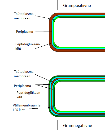 Grampositiivse ja gramnegatiivse bakteri rakuseina erinevused ja sarnased